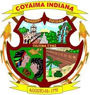 Escudo del Municipio de Coyaima (Tolima)